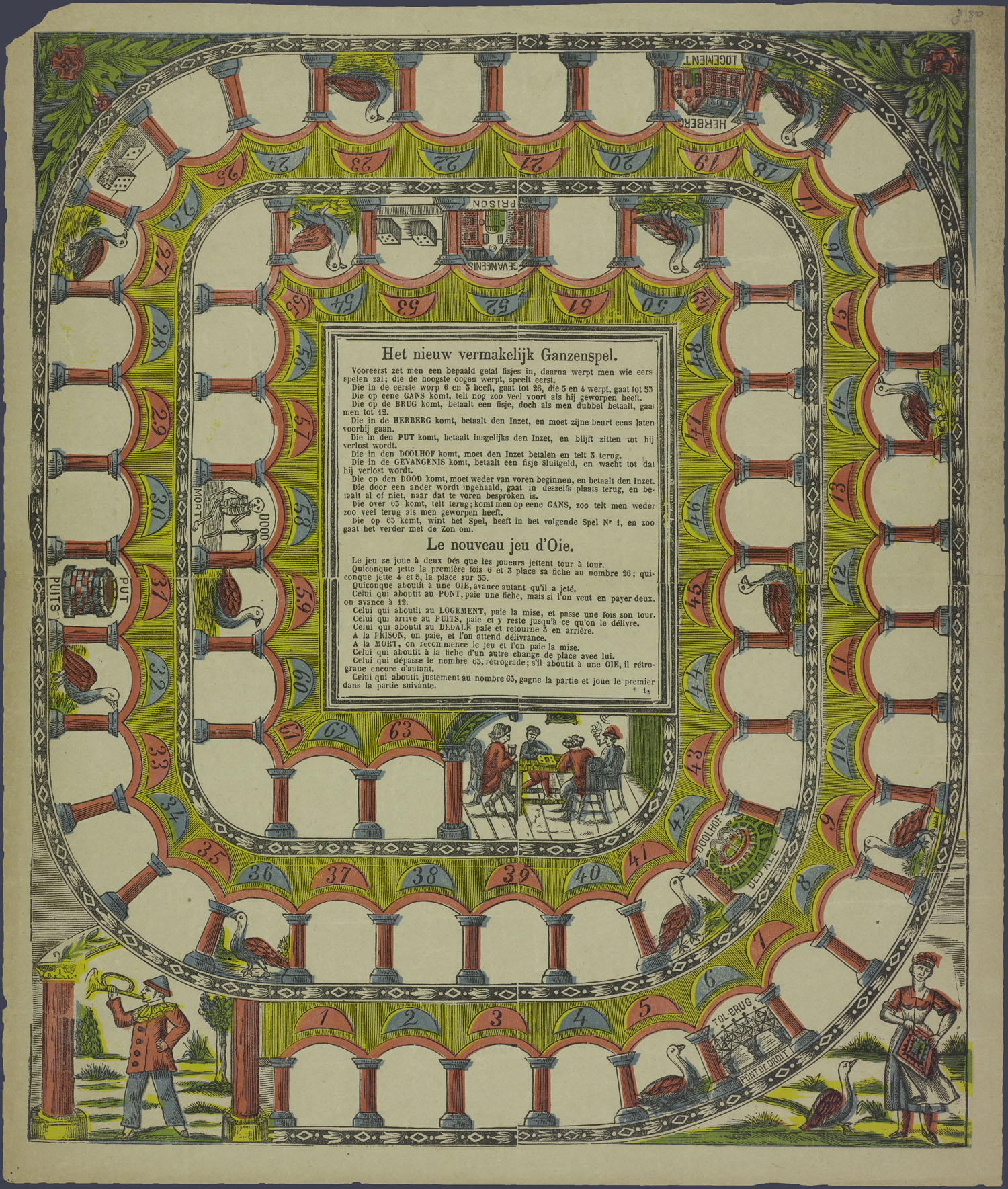 Centsprent met een in kleur gedrukte litho met een afbeelding van een ganzenbord in een spiraal met 63 vakjes, eindigend bij een kleine afbeelding van een tafel met vier heren eromheen. In het midden in een dubbel omkaderde rechthoek het reglement in het Nederlands en het Frans. In de hoeken afbeeldingen van bloemen (bovenaan) en een trompetter en een vrouw met gans (onderaan).